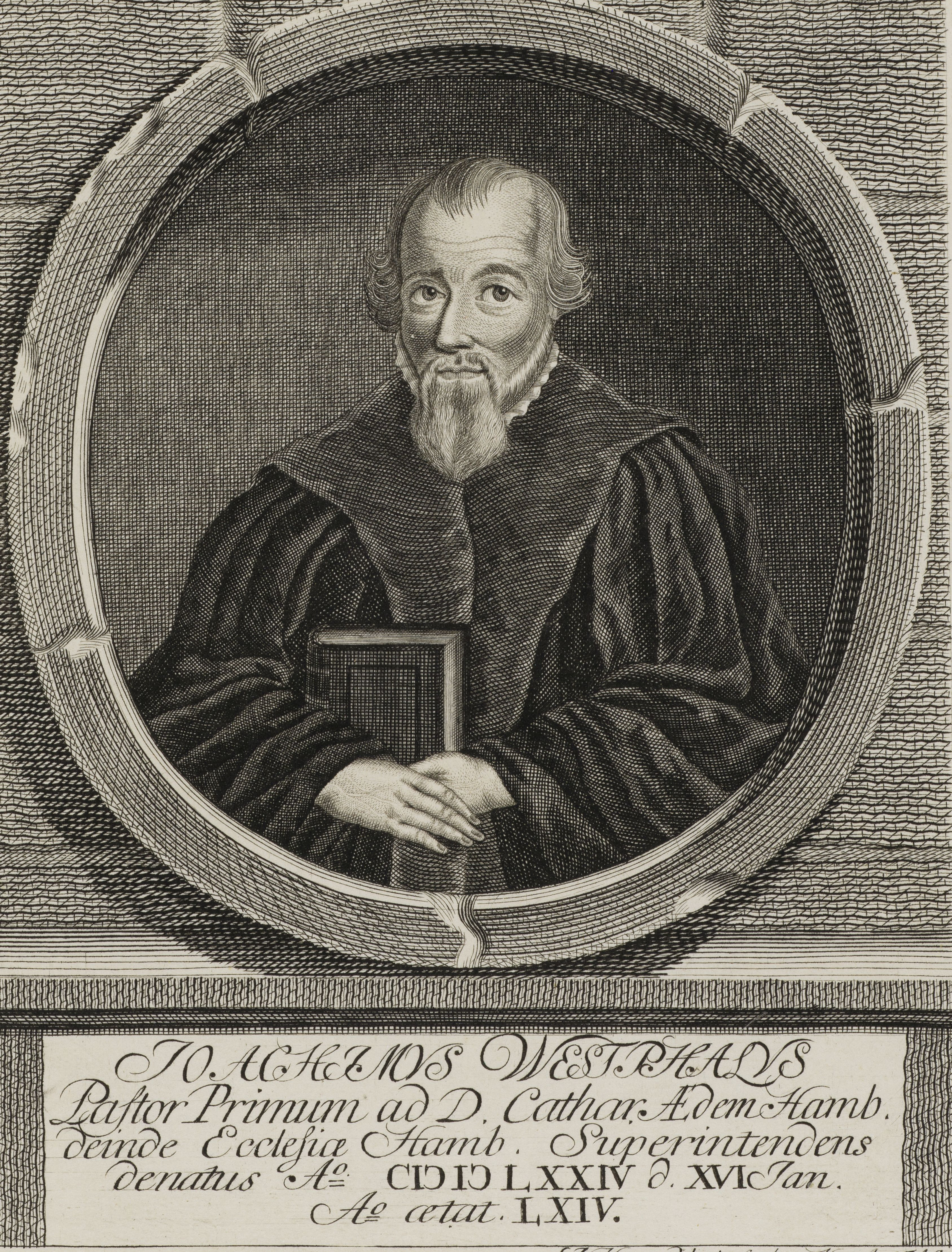 Joachimvs Westphalvs